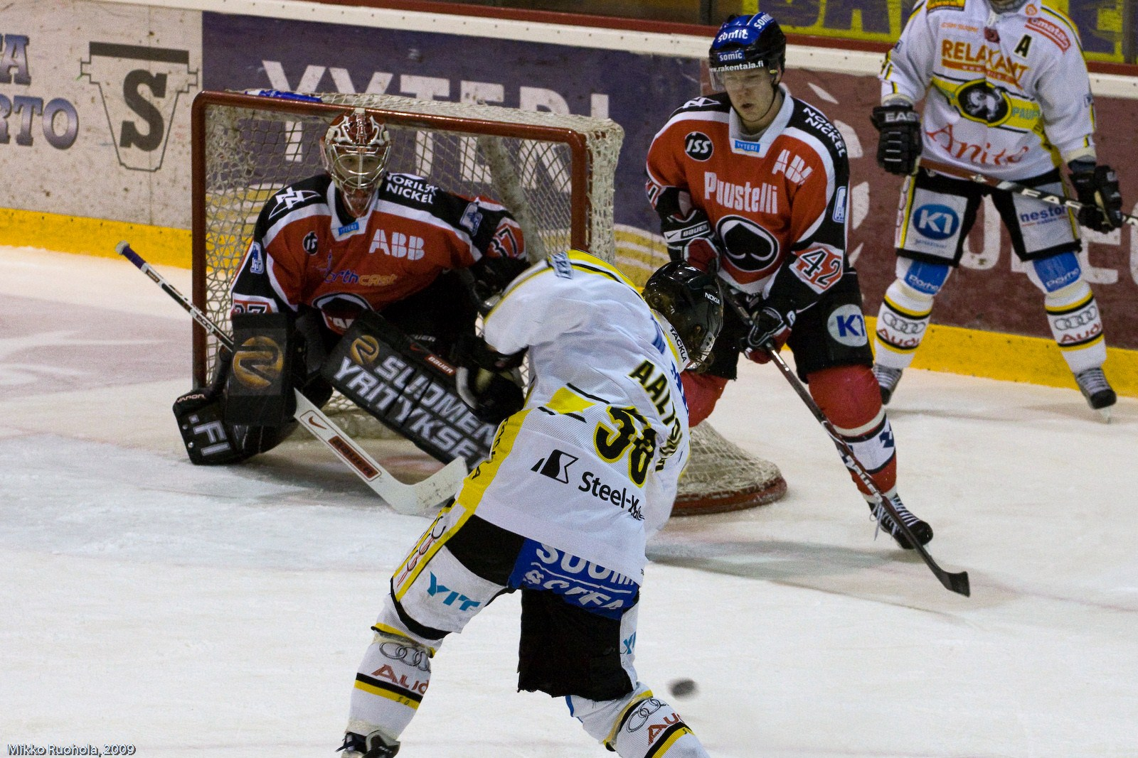 Slapshot by Juhamatti Aaltonen from Oulun Kärpät playing against Porin Ässät as a home team, Eero Kilpeläinen as a goalie for Ässät.